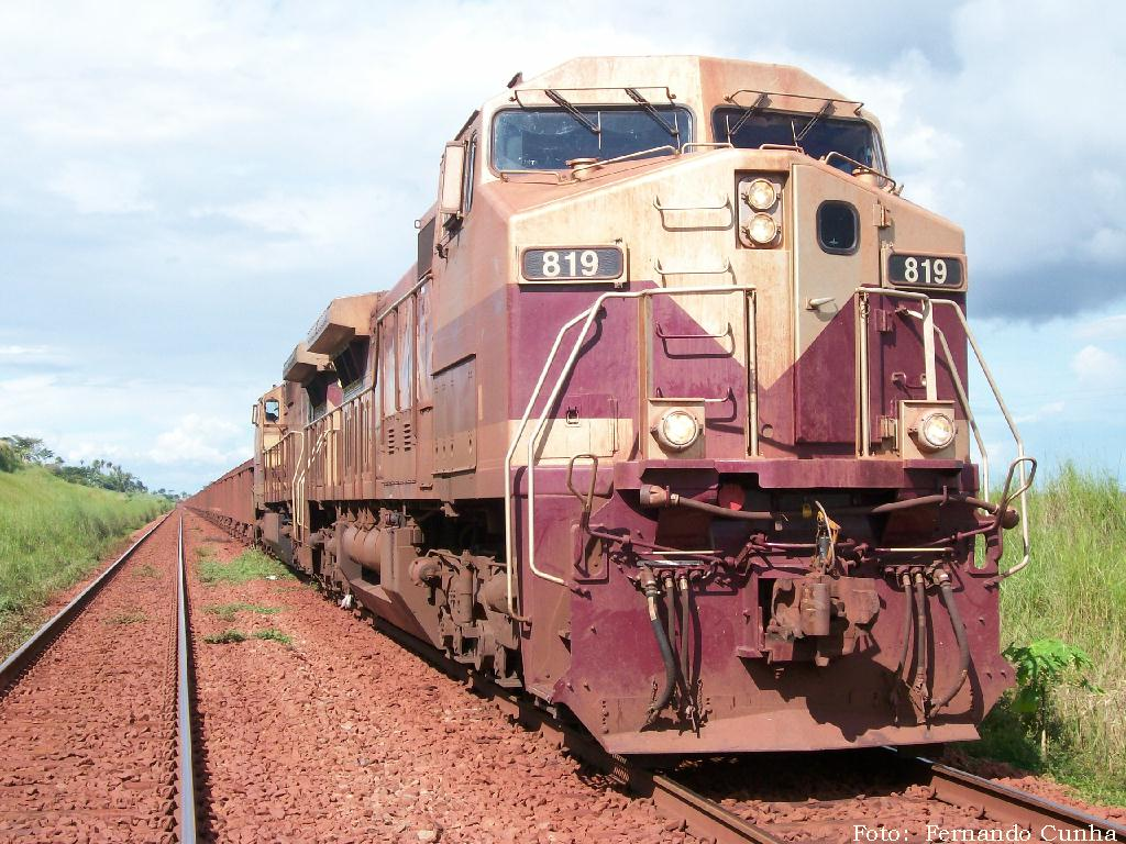 EFC 819, GE C44-9WM (Dash-9), adquirida em 01/2005 - MA - Brasil